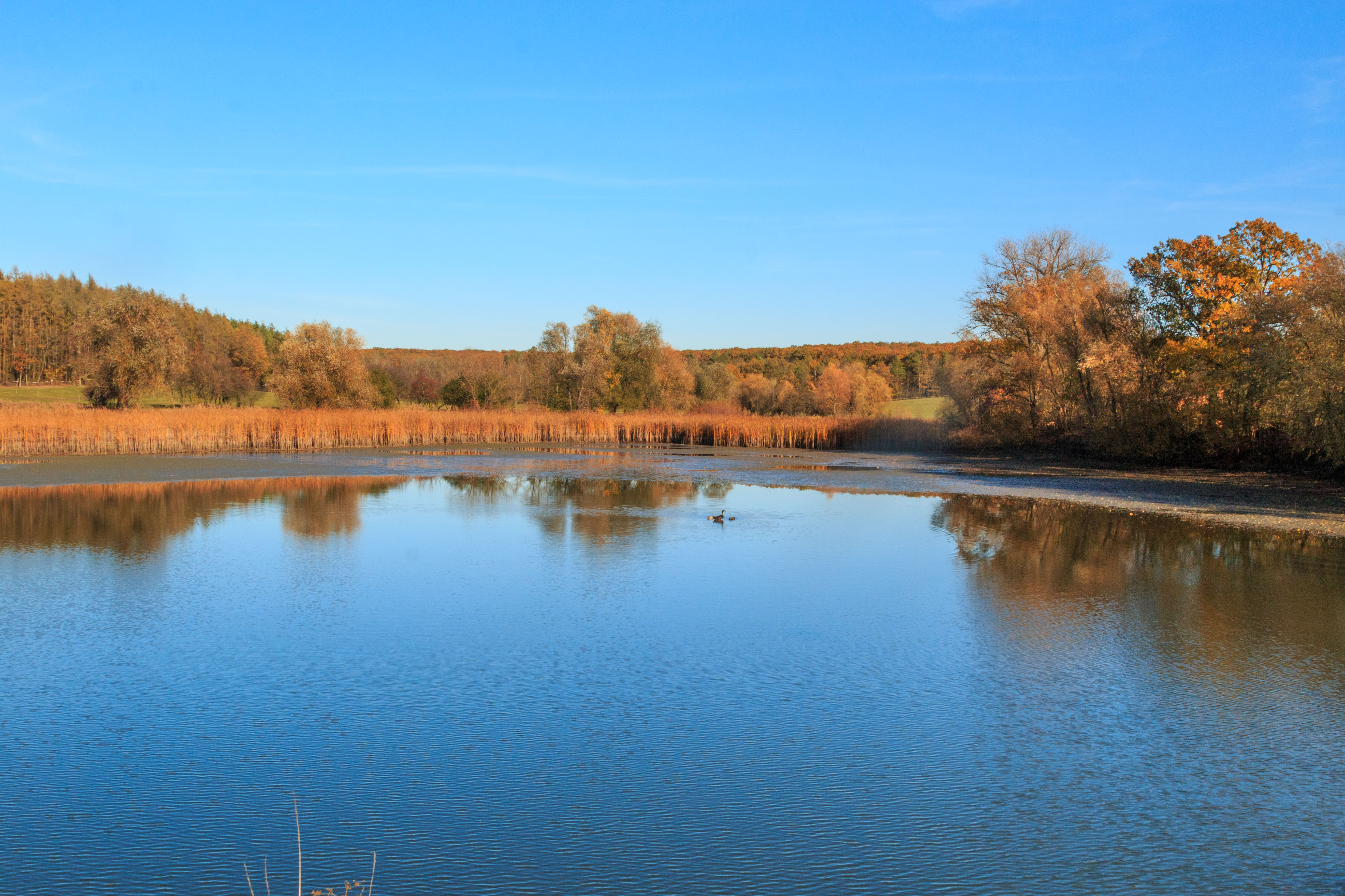 Holský rybník u Ledkova